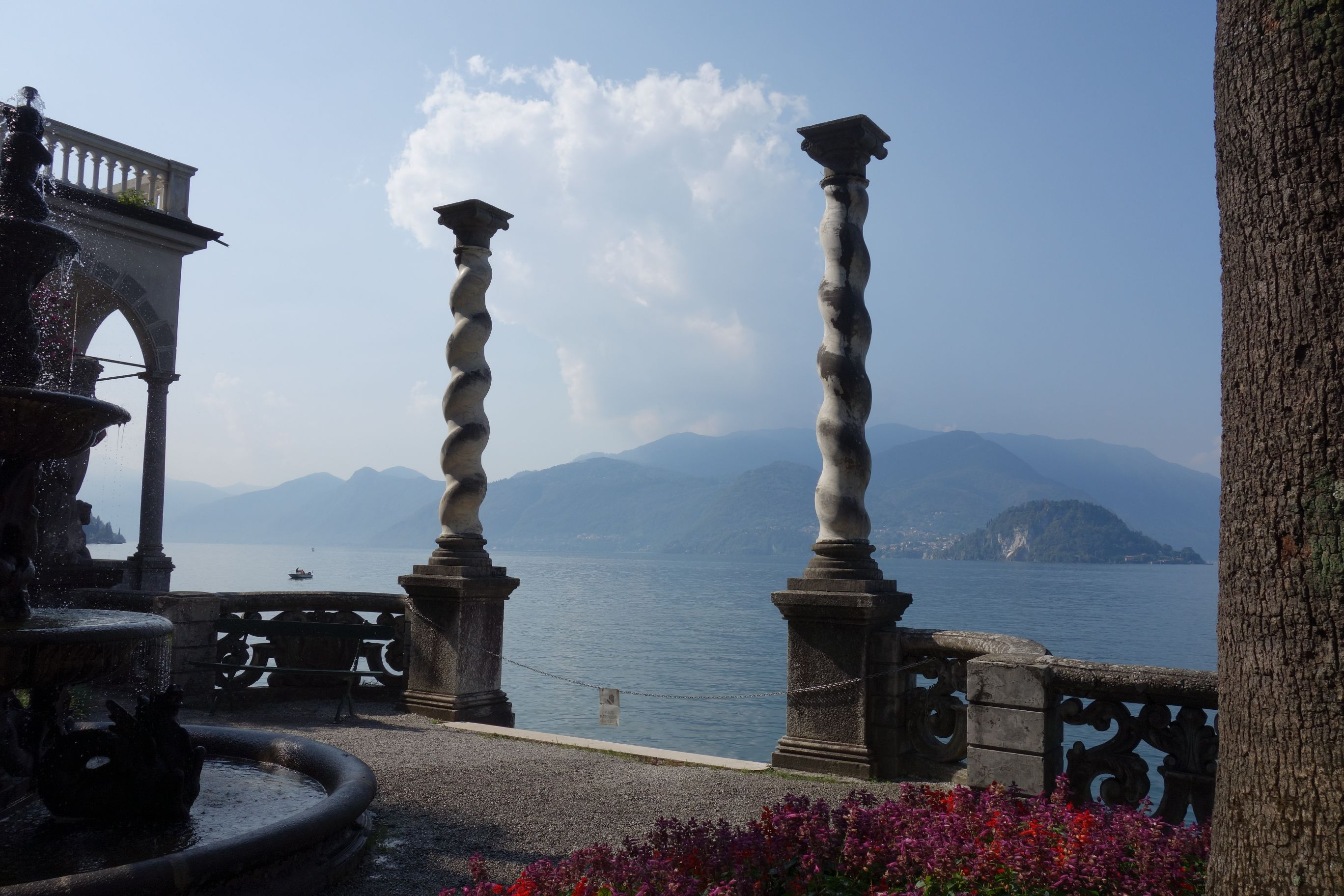 Esino Lario e Varenna